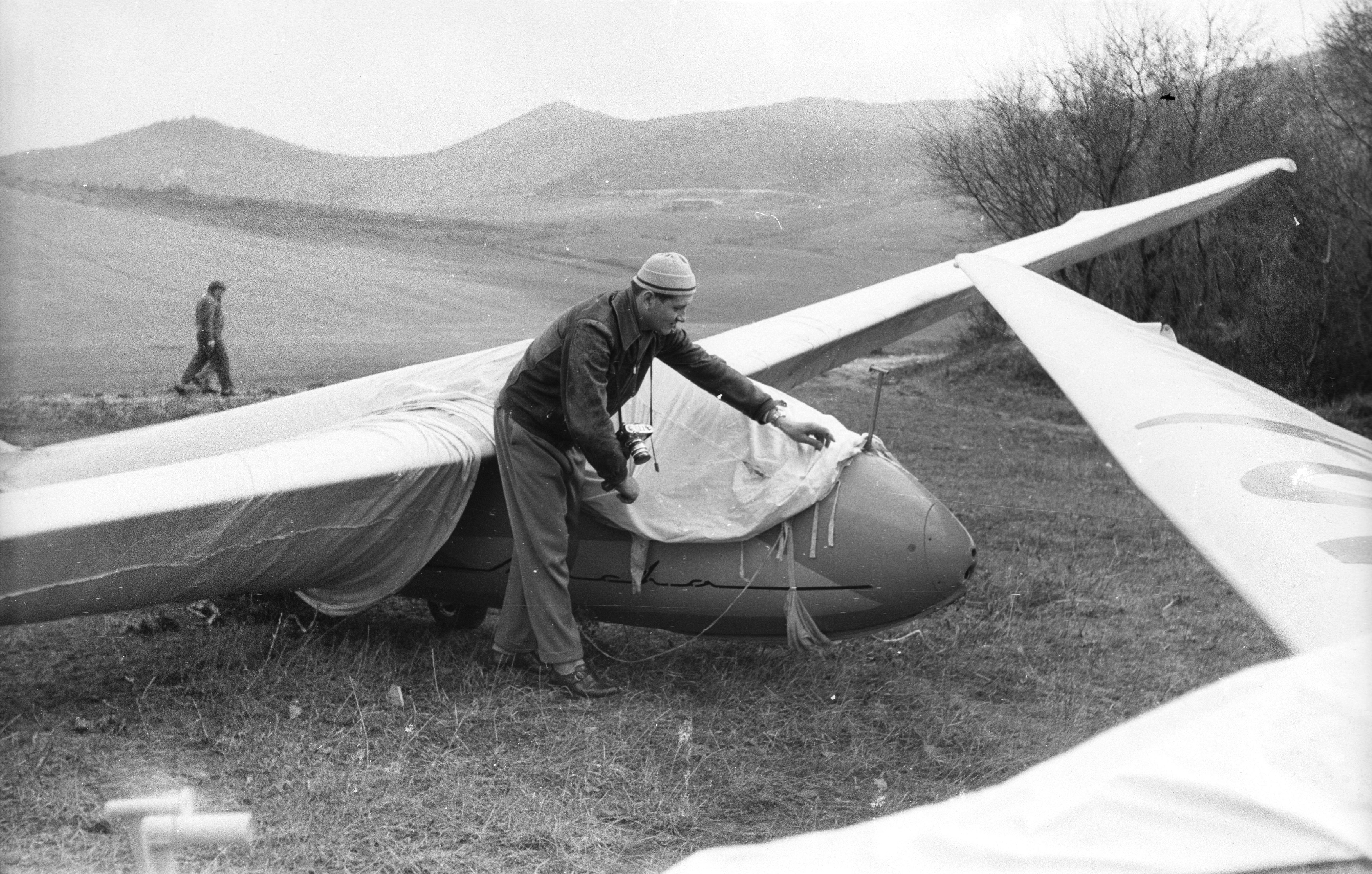 SZD-22C Mucha vitorlázó repülőgép. Location: Hungary, Budapest II., Hármashatárhegy Airport Tags: airport, airplane, sailplane, Polish brand, Budapest Title: SZD-22C Mucha vitorlázó repülőgép.